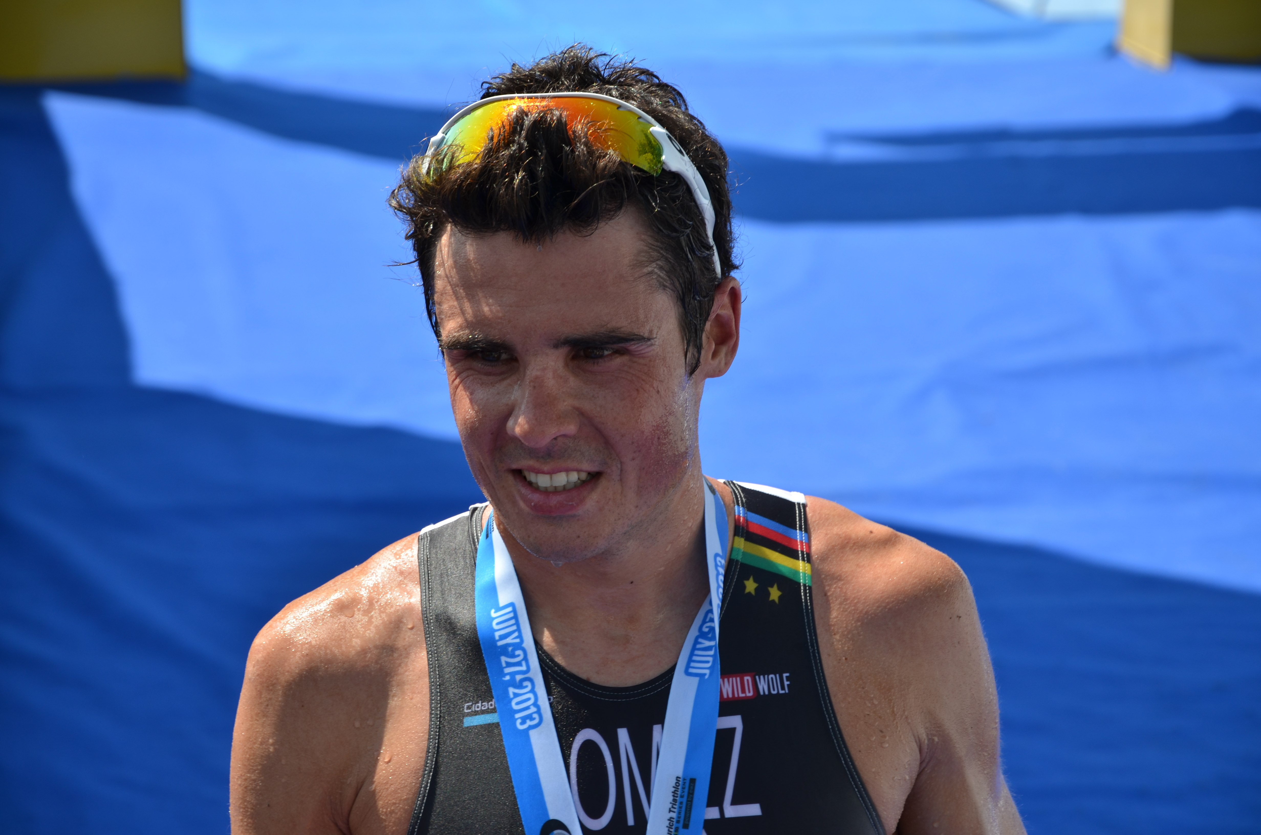 Javier Gomez vince a Zurigo gli Europei 5i50 - photo by Nicola Pfund